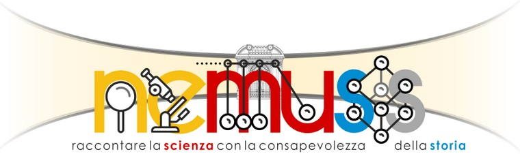 Logo del NEMUSS - Museo Scientifico "Nevio"